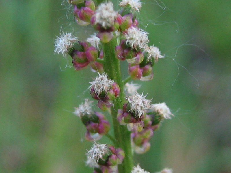 Strand-Dreizack Triglochin maritimum, Zingst